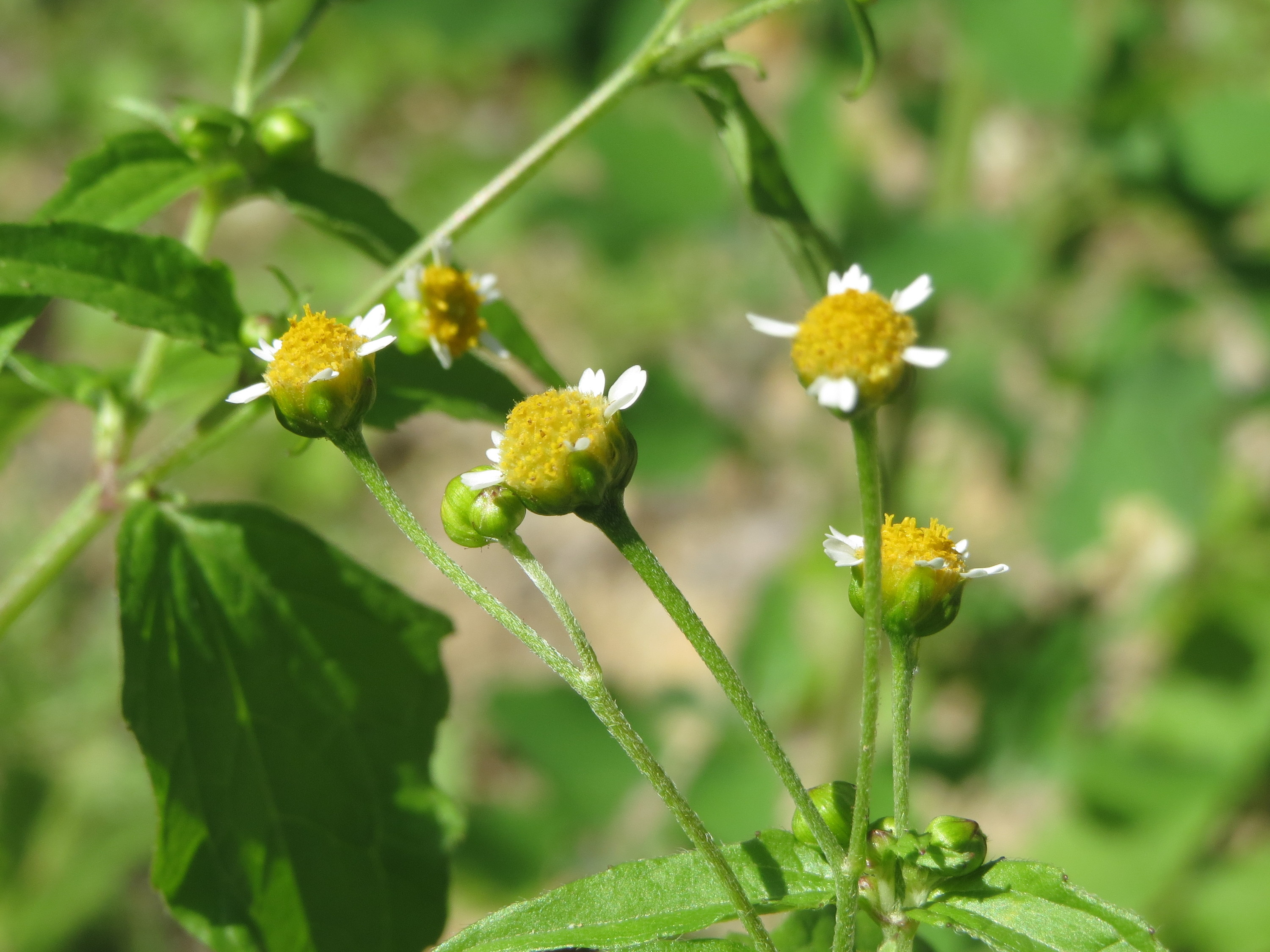 Kleinblütiges Knopfkraut (Galinsoga parviflora) in Hockenheim